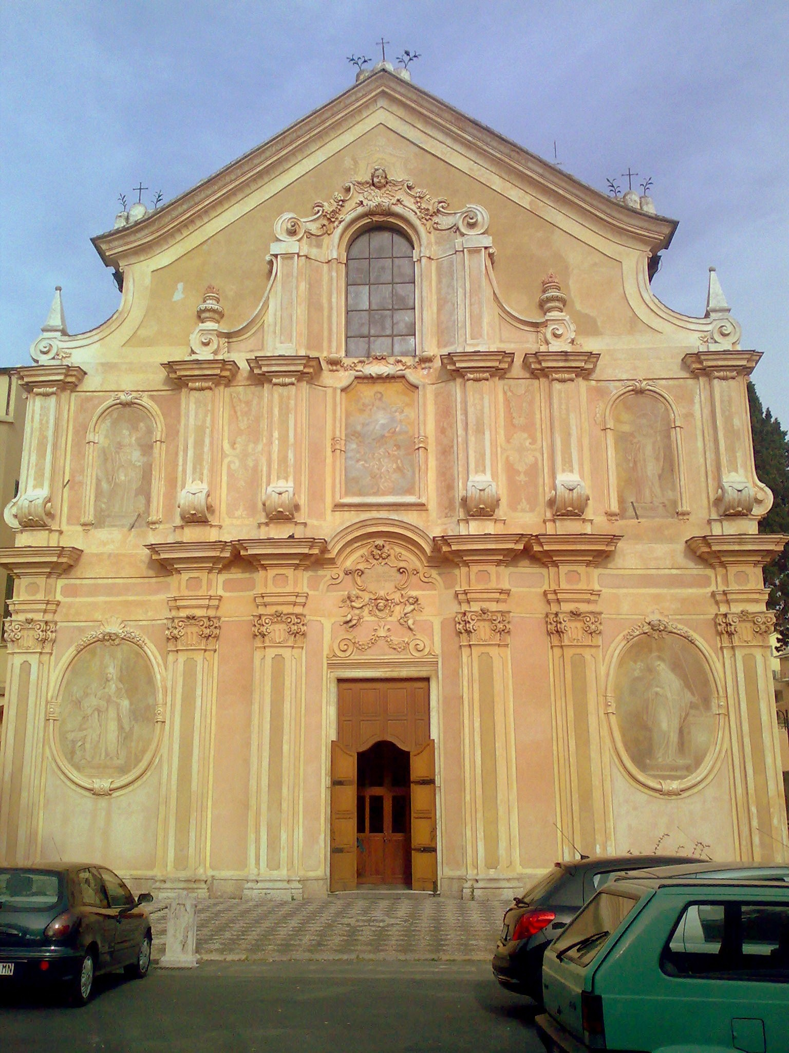 Facciata della chiesa di Santa Maria della frazione di Finalpia in Finale Ligure (Italy)